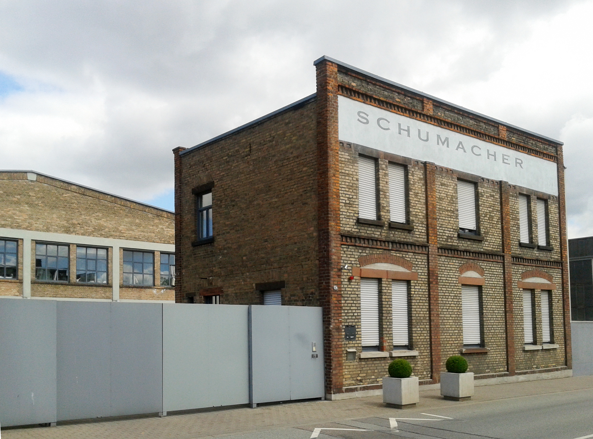 Schumacher GmbH in Mannheim, Industriestr. 47